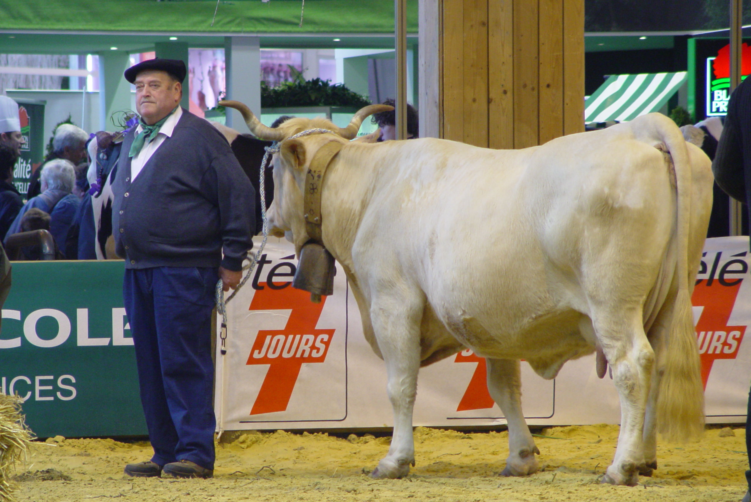 Photographie de Myrtille, vache Lourdaise exposée au Salon de l'Agricuture de Paris par son propriétaire Fernand Amaré, éleveur à Bagnères de Bigorre, mars 2010